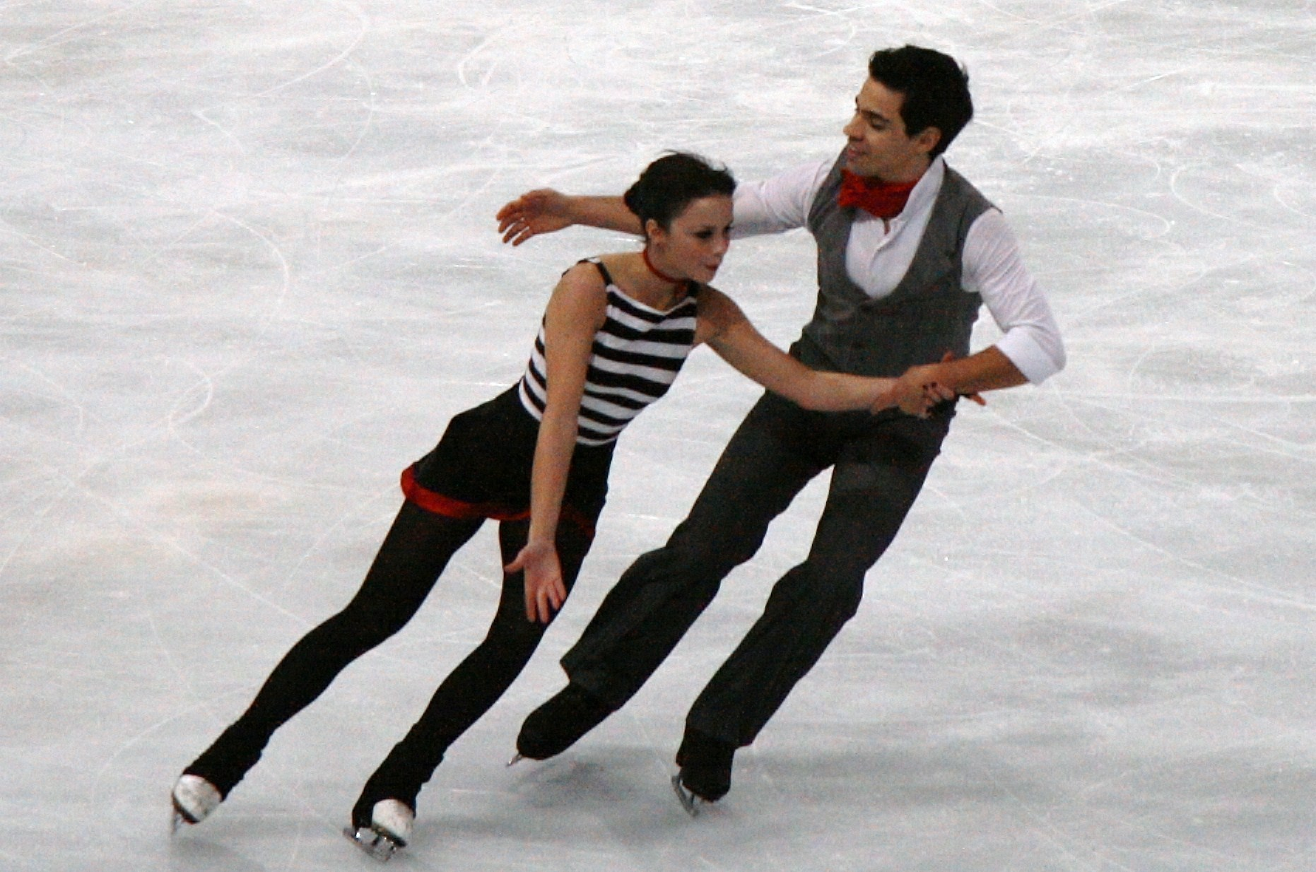 Анна Каппеллини и Лука Ланотте на 2011 Trophée Eric Bompard